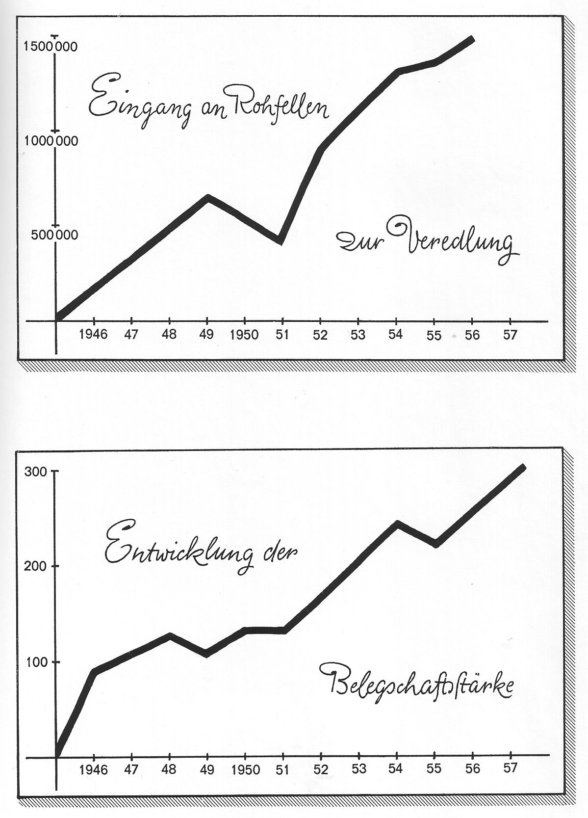 Thorer & Co, Statistik „Eingang an Rohfellen“ und „Entwicklung der Belegschaftsstärke“, 1946-1957.